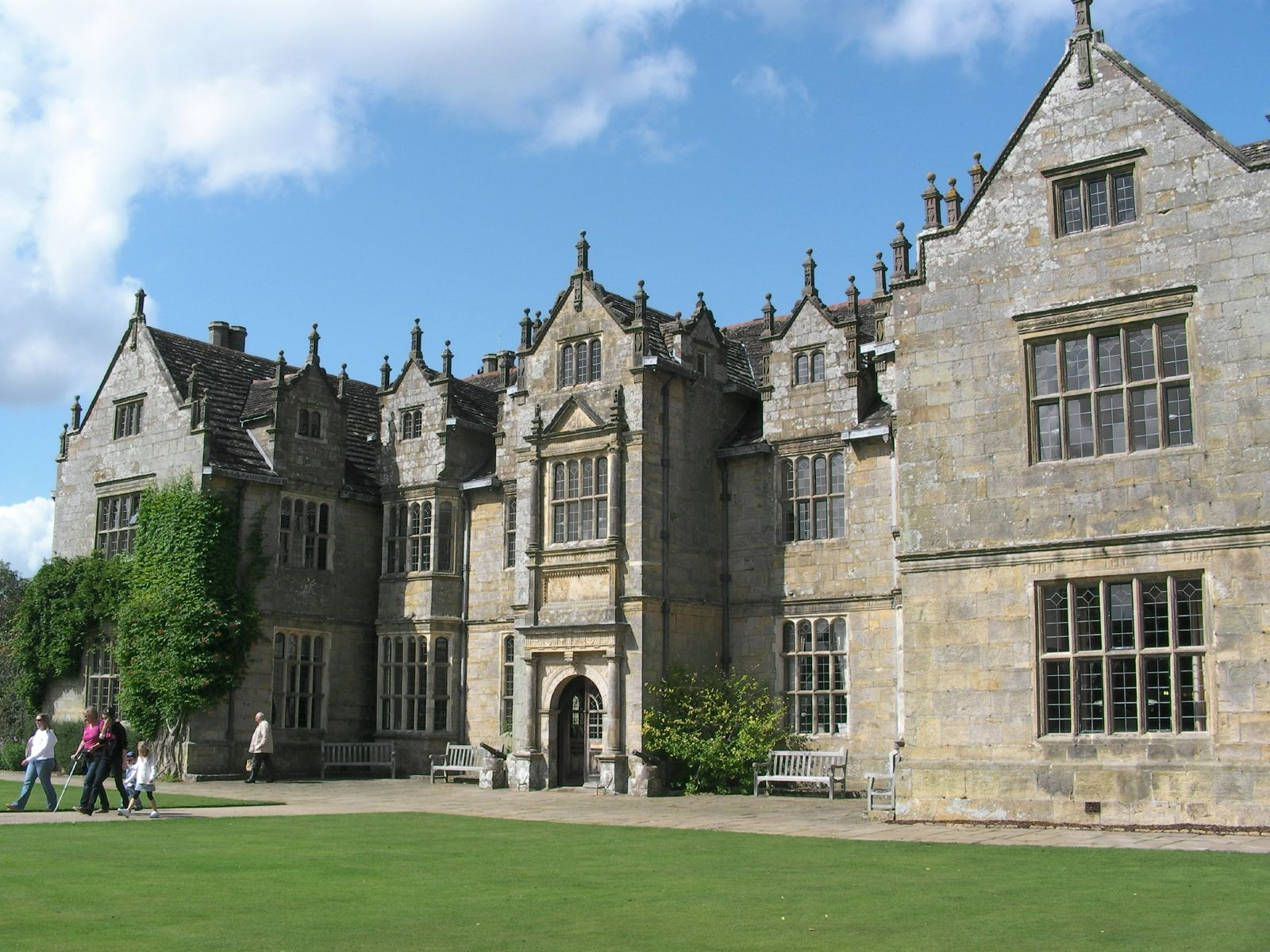 Wakehurst Place, West Sussex